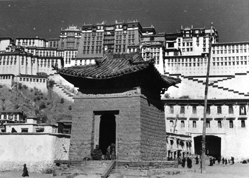 Lhasa, Potala mit Tempelchen